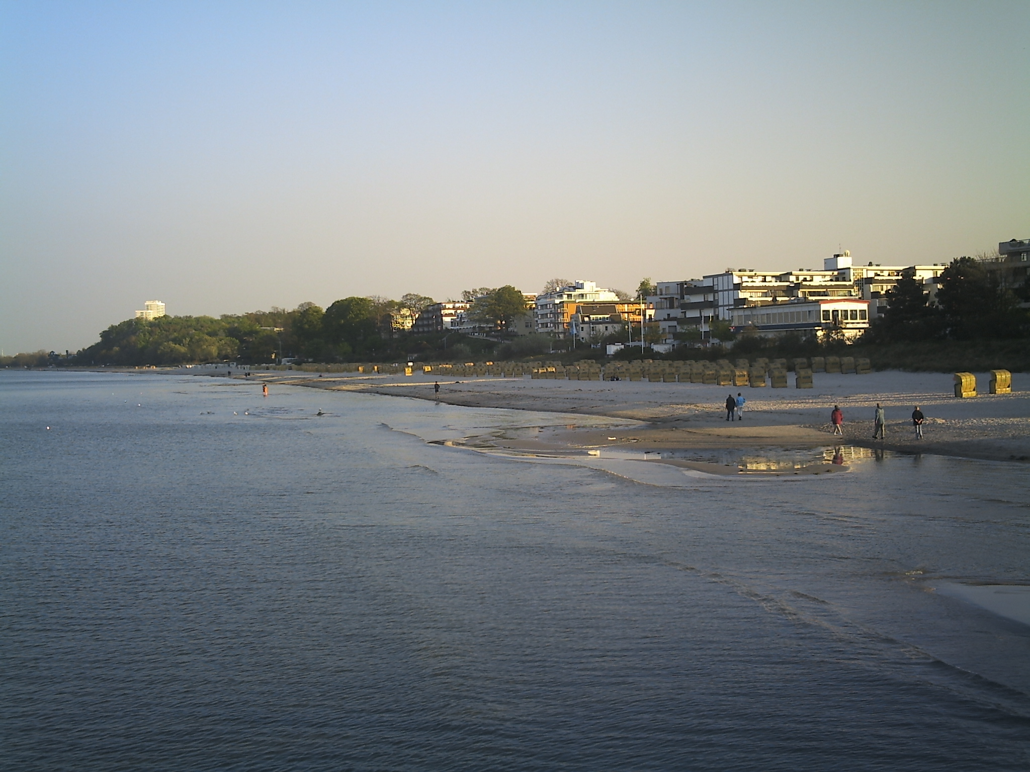 Bastille Am Hang, vom Seesteg Scharbeutz Richtung Ostseetherme.